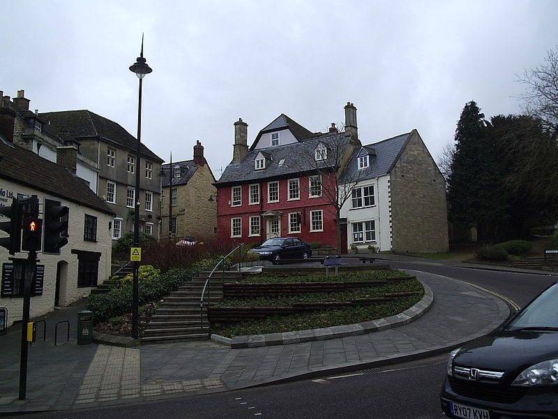 منظر لجانب من بلدة كان الإنكليزية.